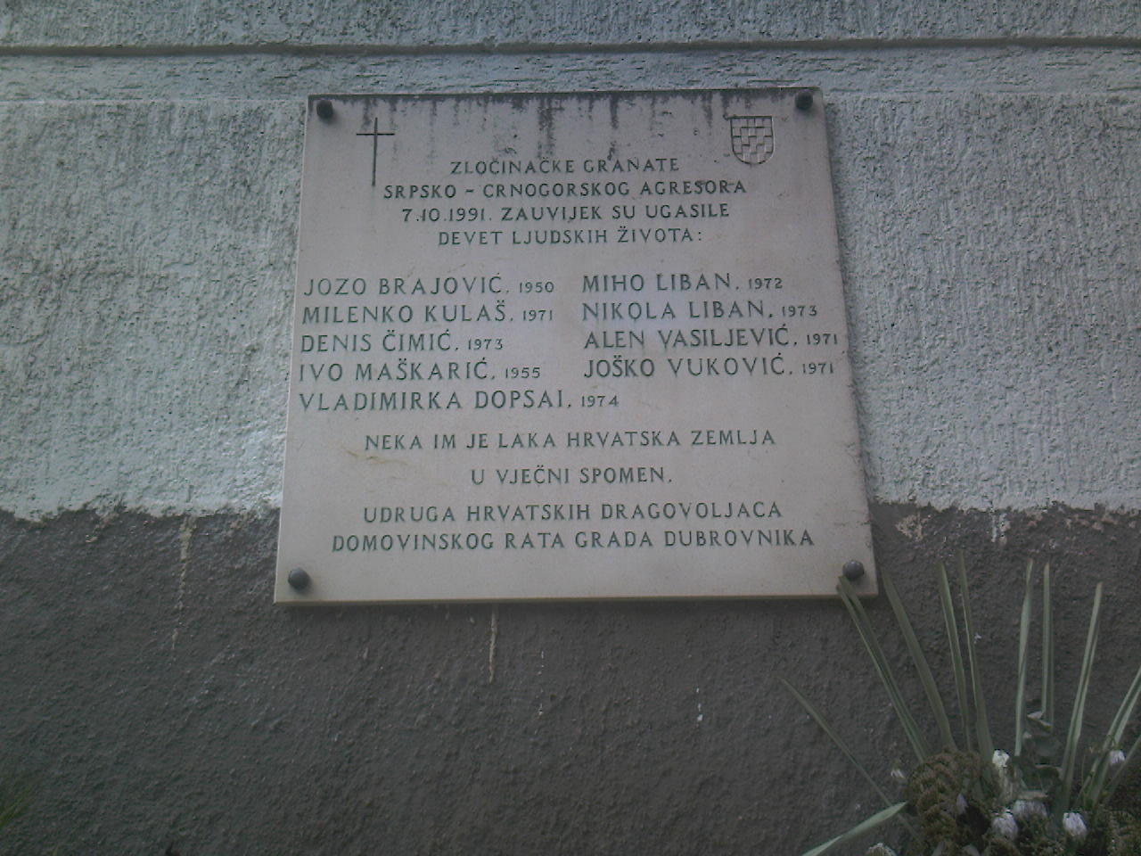 Spomen ploča na mjestu pogibije devetorice civila i branitelja Dubrovnika